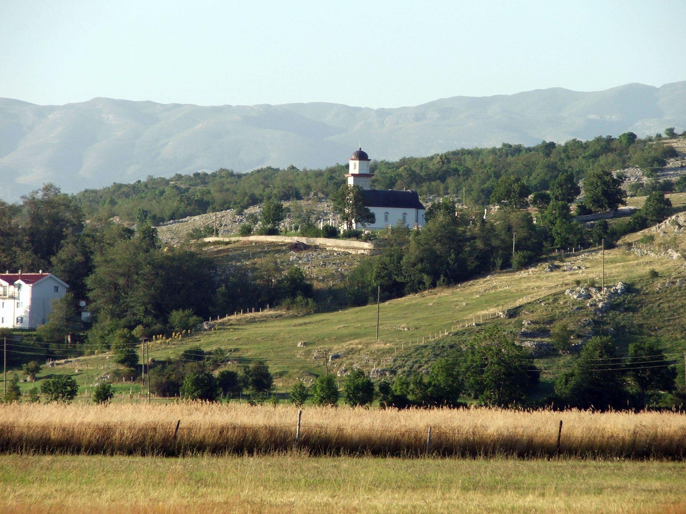 Храм Св. Саве у Самобору